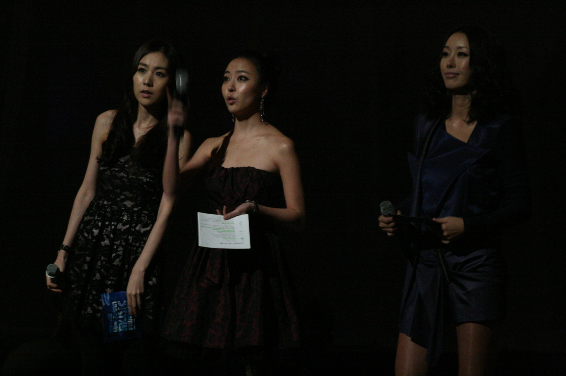 2009 엠넷 아시안 뮤직 어워드